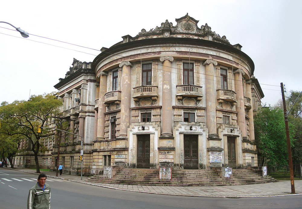 Faculdade de Medicina, um prédio histórico da Universidade Federal do Rio Grande do Sul, Porto Alegre, Brasil.